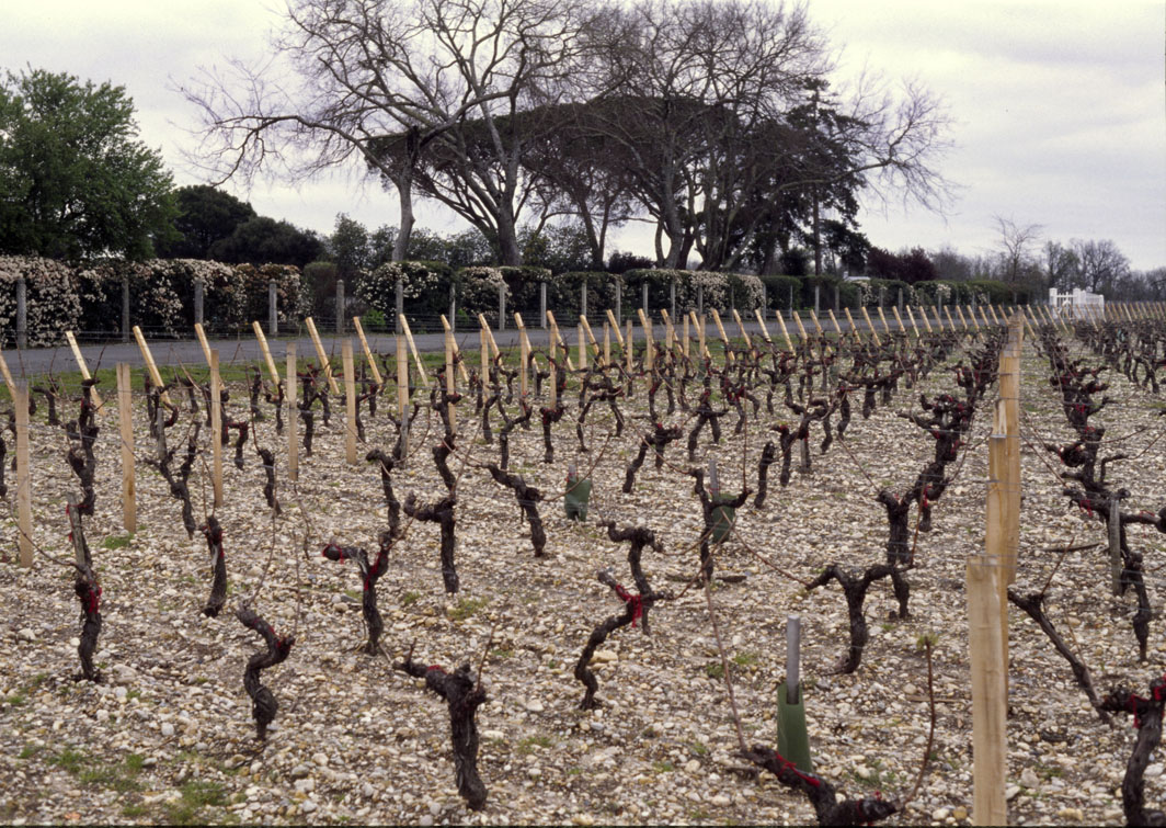 Vigne / Weinberg / Vineyard, Château Chasse-Spleen, Moulis-en-Médoc, France